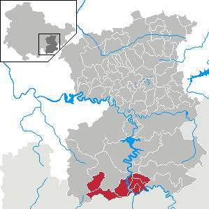 Verwaltungsgemeinschaft Saale-Rennsteig in Thuringia - Saale-Orla-Kreis